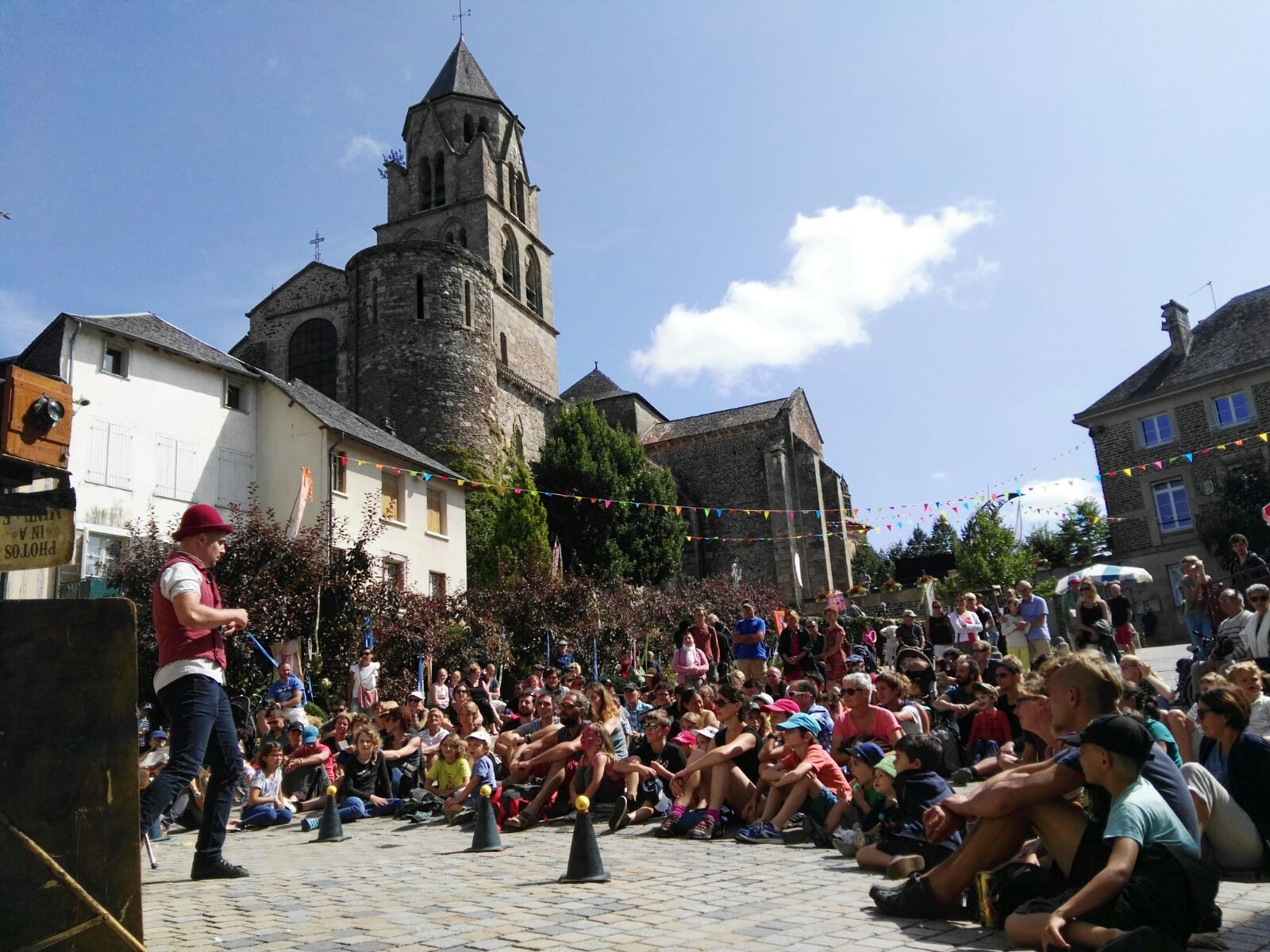 Espectacle MINUTE, de la companyia JAM, a Uzerche (França)